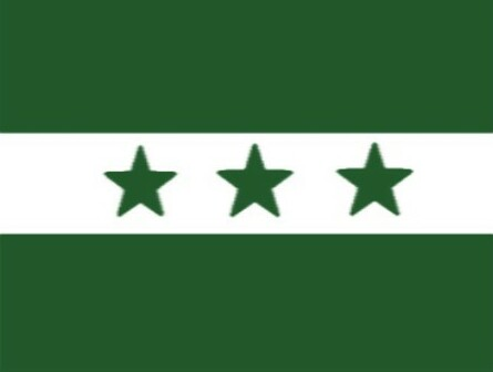 Bandeira da Aliança Livre Sulista